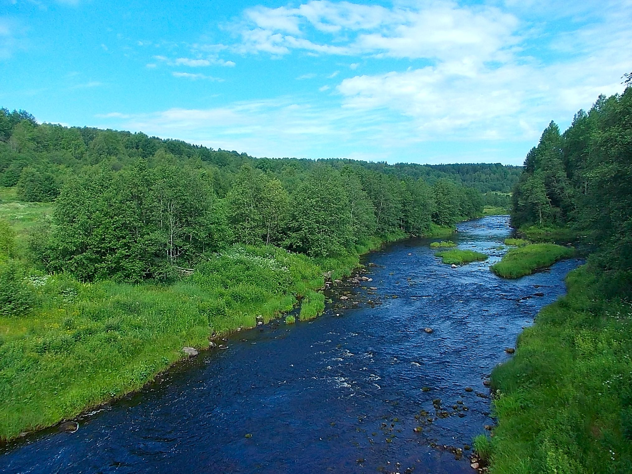 Река Шокша недалеко от устья